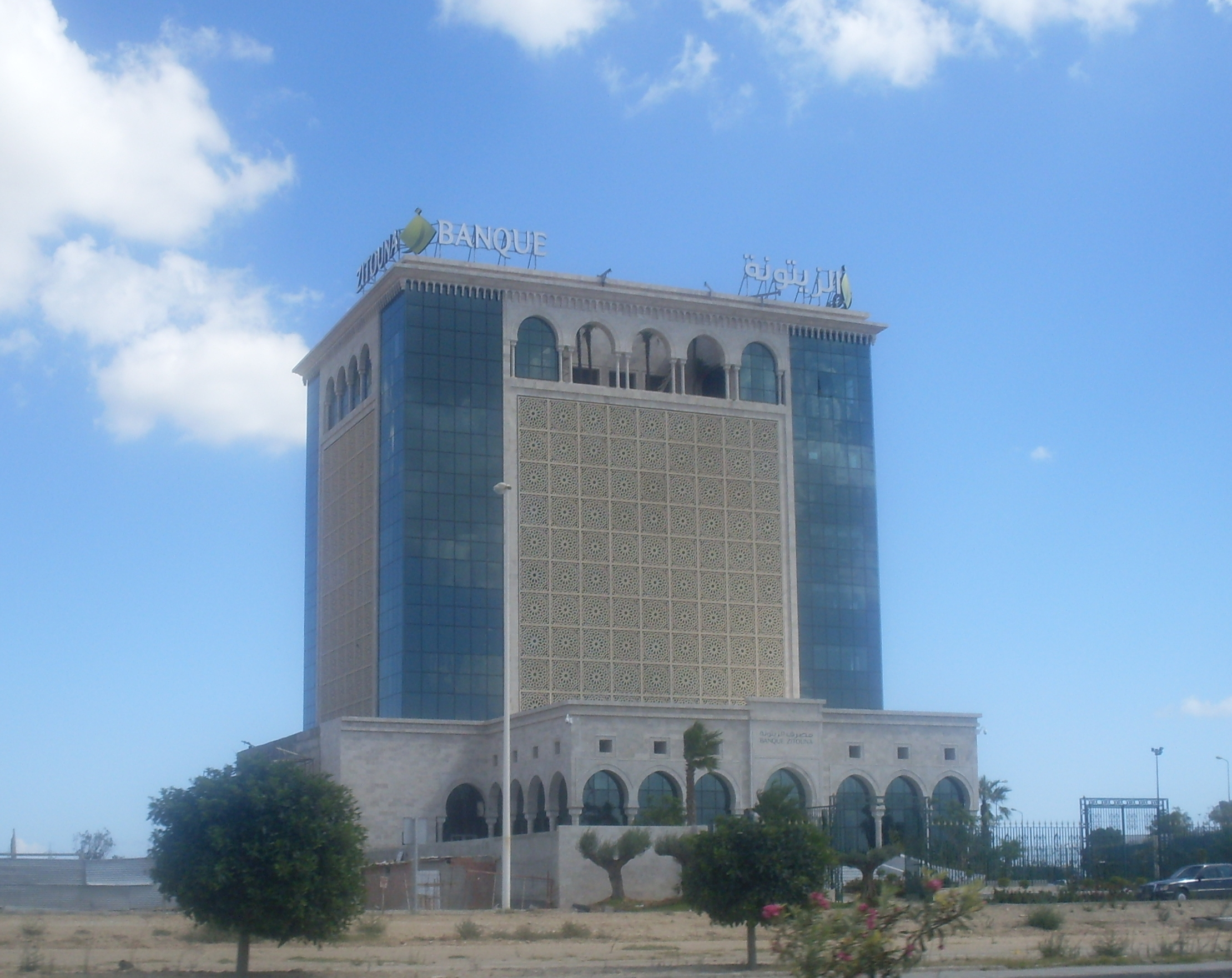 Tunisie, nouveau siège Banque Zitouna